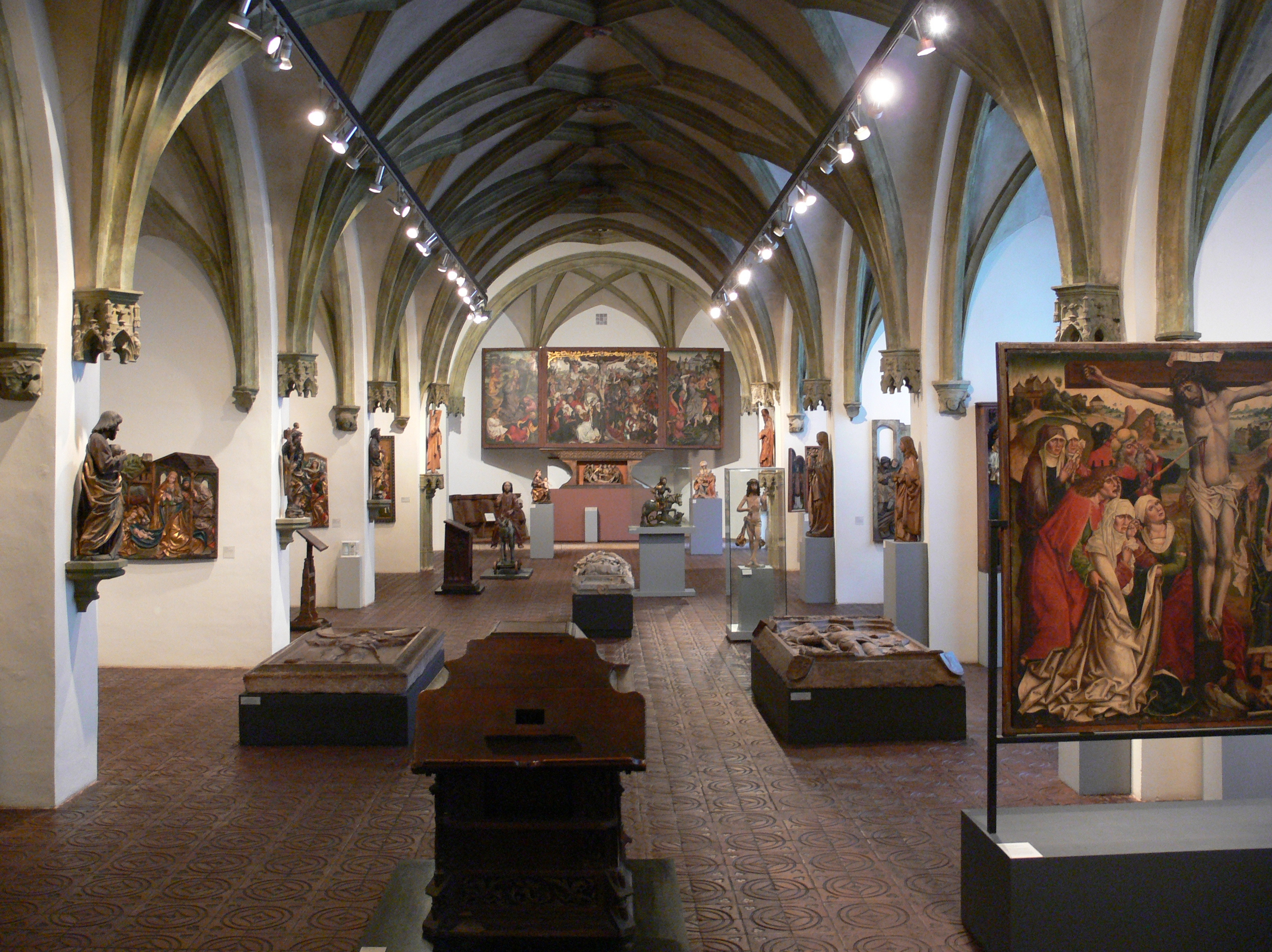 Saal im Bayerischen Nationalmuseum, München